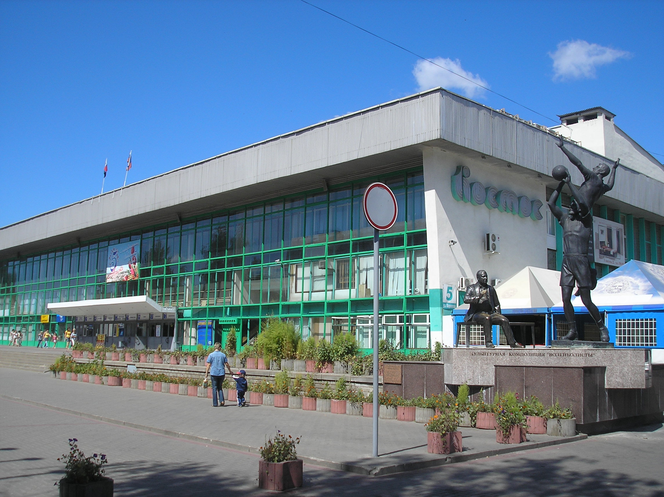 Дворец спорта Космос. г. Белгород